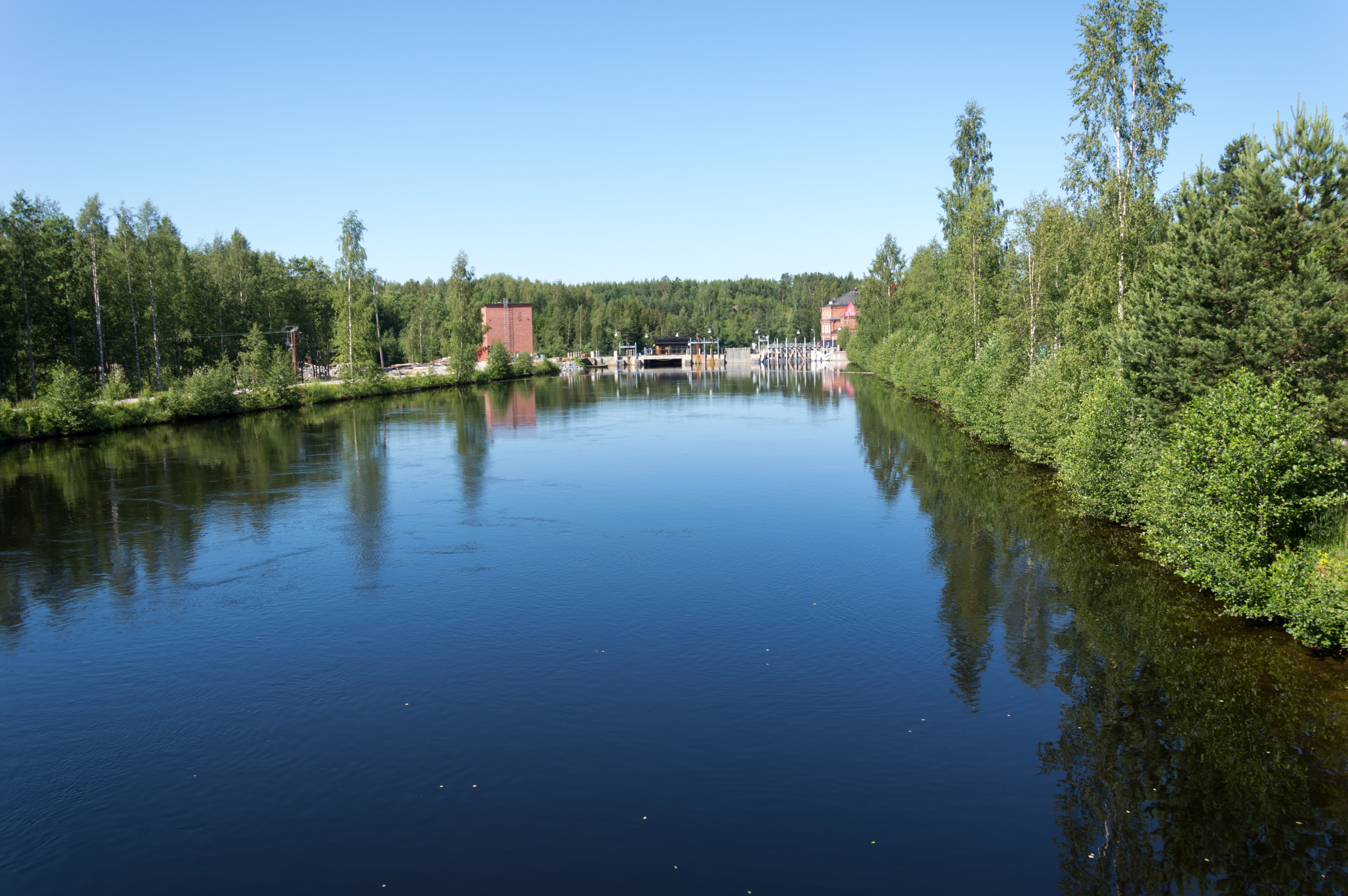 Kissakosken kanava Hirvensalmella